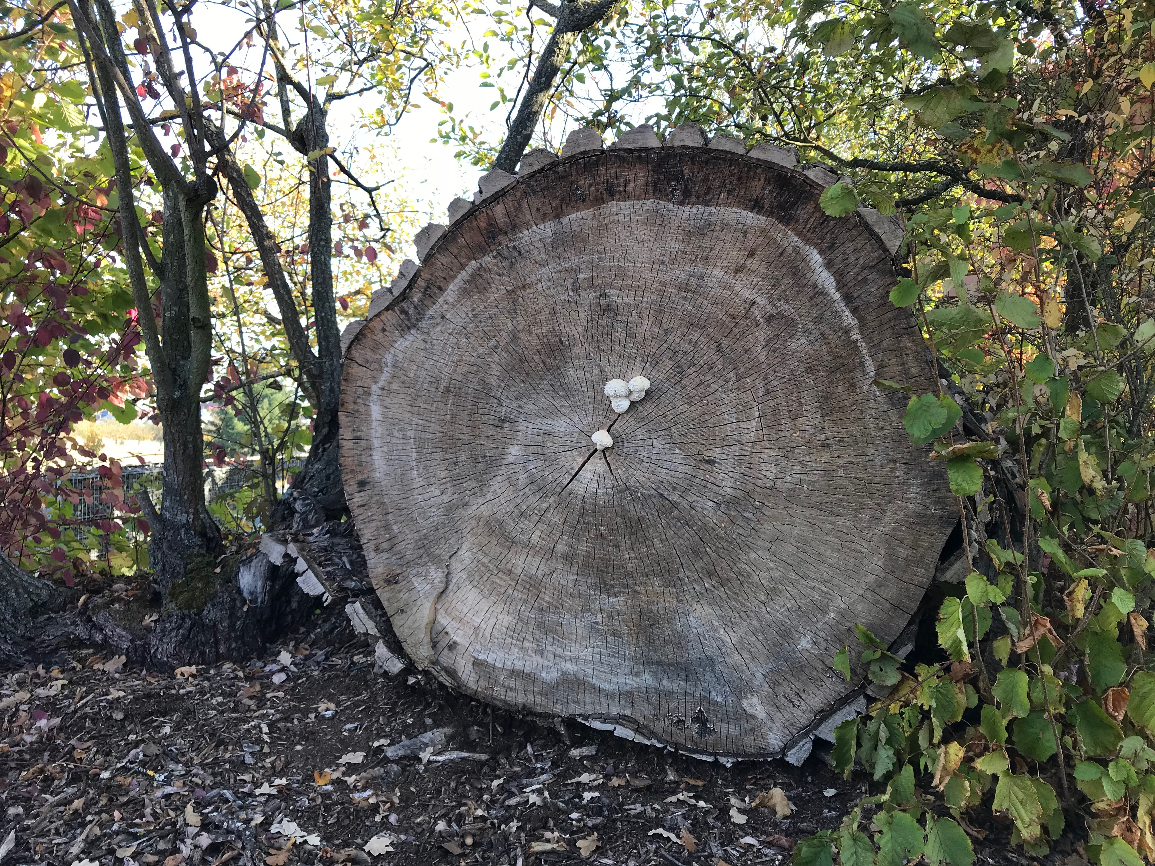 Stamm des "Großen Baums"